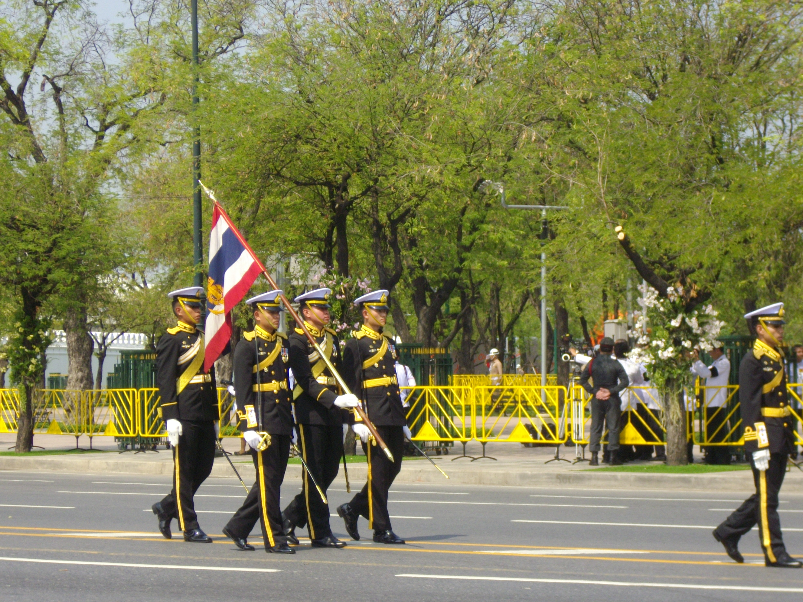 นักเรียนนายเรือจากกรมนักเรียนนายเรือรักษาพระองค์ โรงเรียนนายเรือ ในเครื่องแบบเต็มยศรักษาพระองค์ อัญเชิญธงชัยเฉลิมพล นำกองพันทหารเกียรติยศ ในริ้วกระบวนพระอิสริยยศสำหรับพระศพ สมเด็จพระเจ้าภคินีเธอ เจ้าฟ้าเพชรรัตนราชสุดา สิริโสภาพัณณวดี ระหว่างการอัญเชิญพระศพด้วยพระมหาพิชัยราชรถ จากหน้าวัดพระเชตุพนวิมลมังคลาราม ไปยังพระเมรุท้องสนามหลวง วันที่ 9 เมษายน พ.ศ. 2555